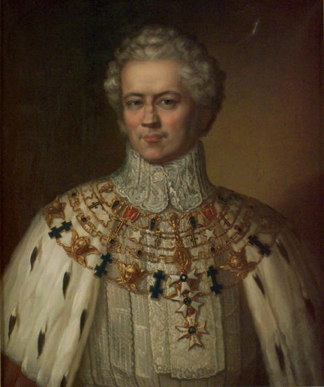 Porträtt av Gustaf af Wetterstedt (1776-1837) iklädd riksrådsdräkt med riksrådsmantel. Runt halsen bär han ordenskedjorna för Serfimerorden, Svärdsorden, Nordstjärneorden samt Vasaorden. Målning från ca 1830 av Carl Wilhelm Nordgren.